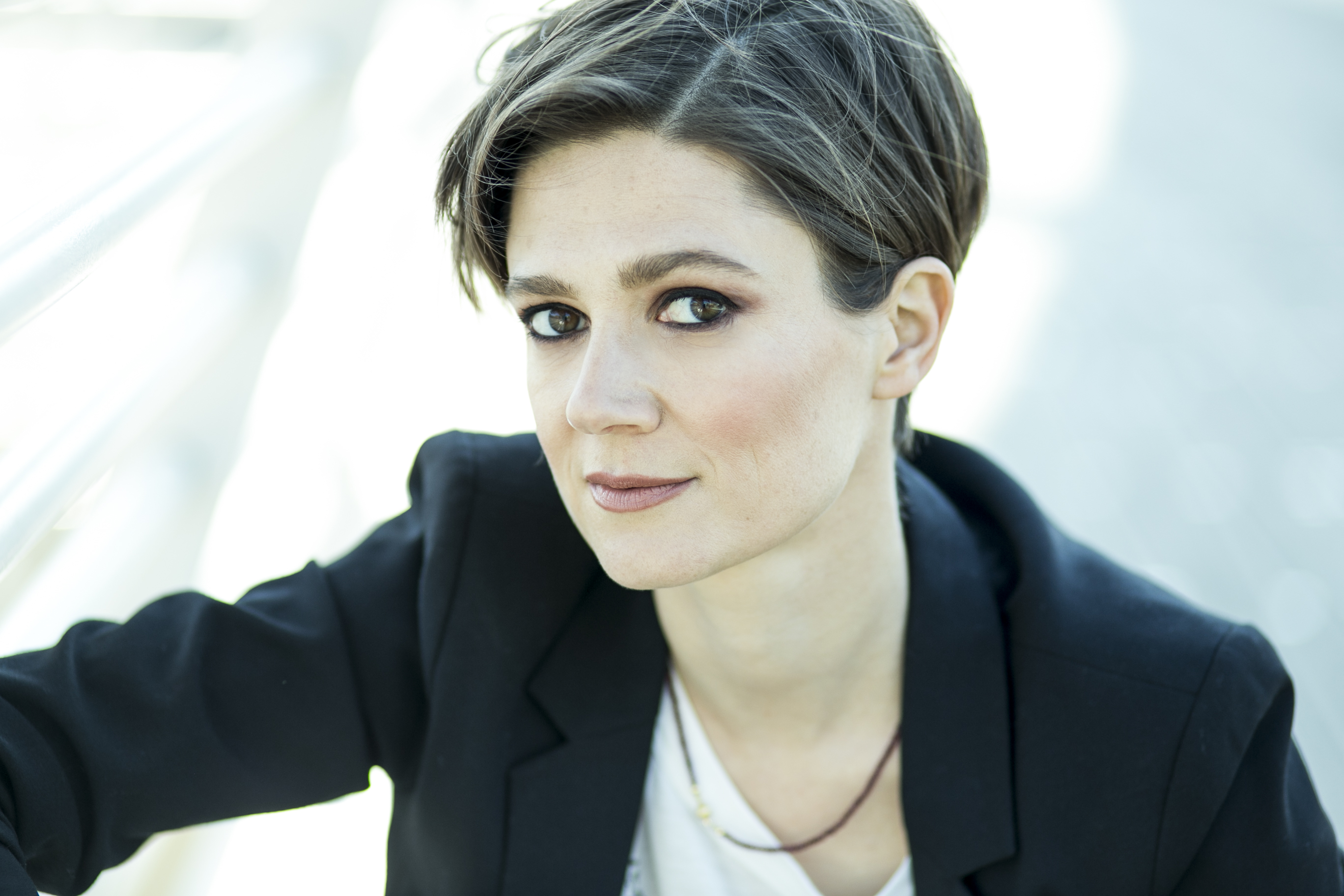 Silvia Bencivelli; primavera 2017